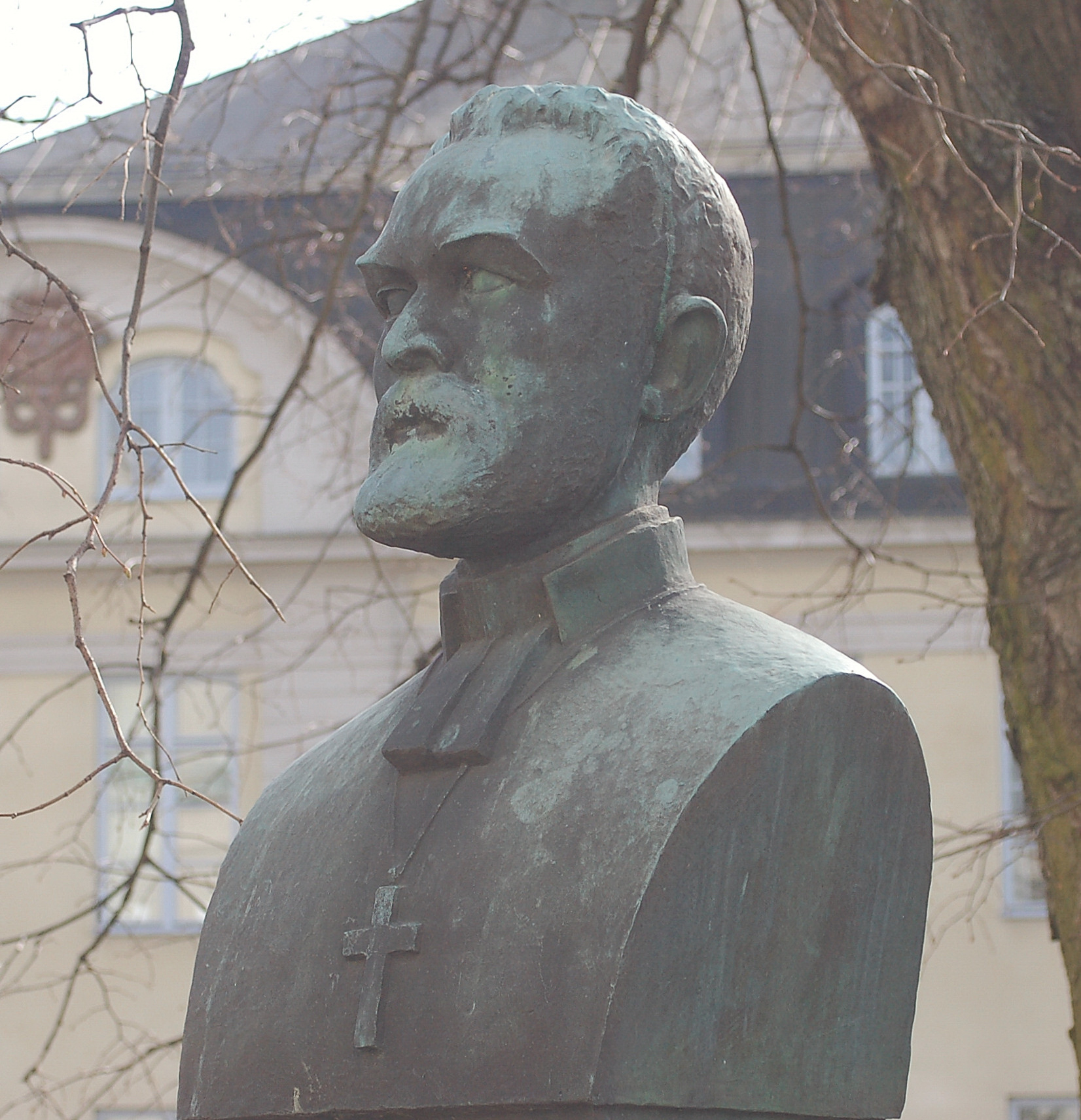 Johan Alfred Eklund byst utförd av Sixten Nilsson och Niklas Göran 1963 placerad i parken vid domkyrkan Tingvallastaden, Karlstad.